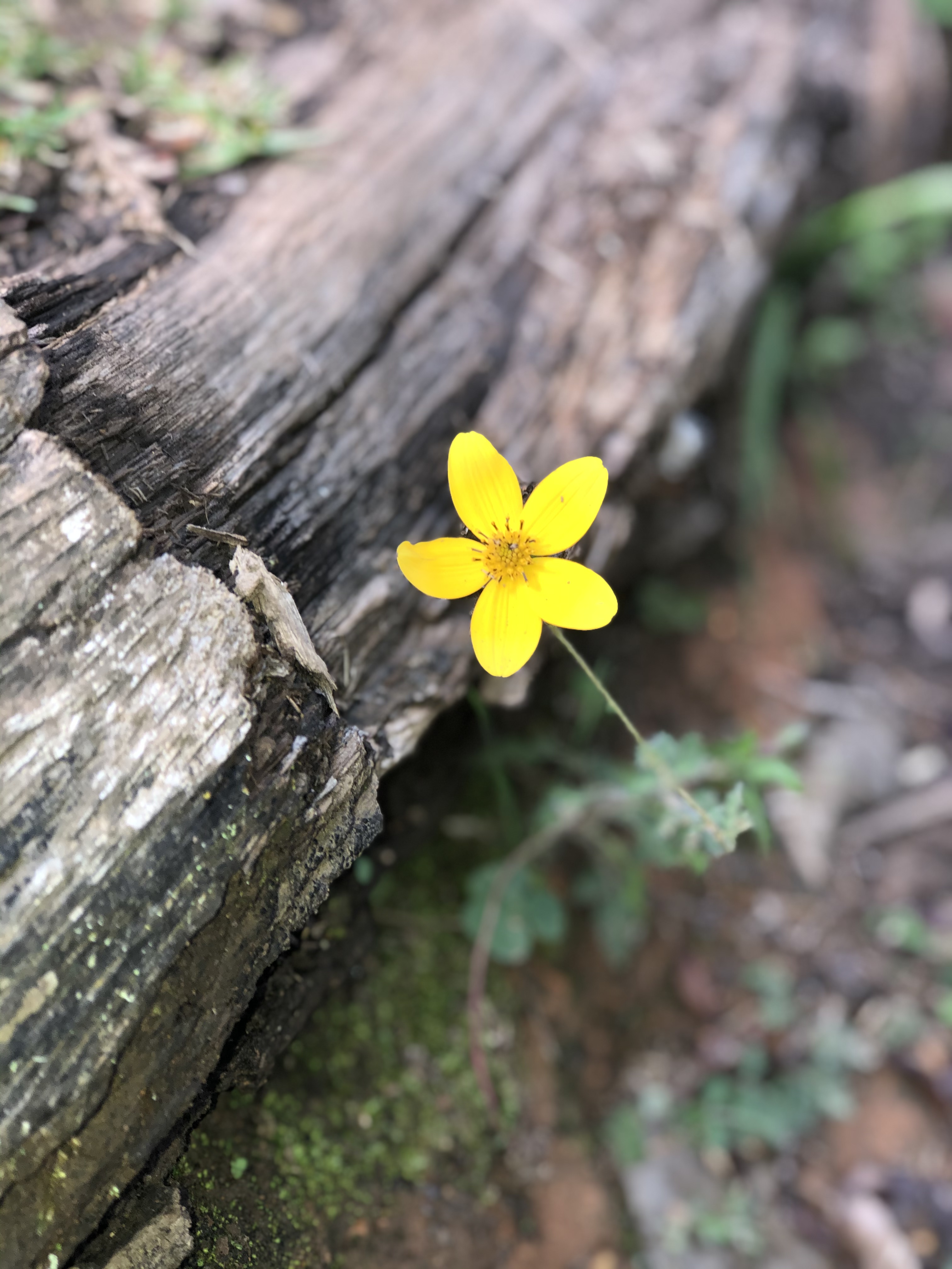 Oxalis amarilla, tomada en zona arqueologica Ranas.